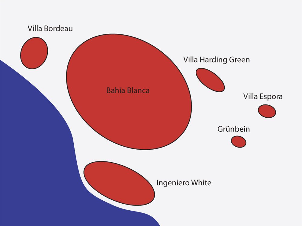 Gran Bahía Blanca /Argentina (Bahía Blanca, Ingeniero White, Grünbein, Villa Espora, Villa Harding Green, Villa Bordeau)